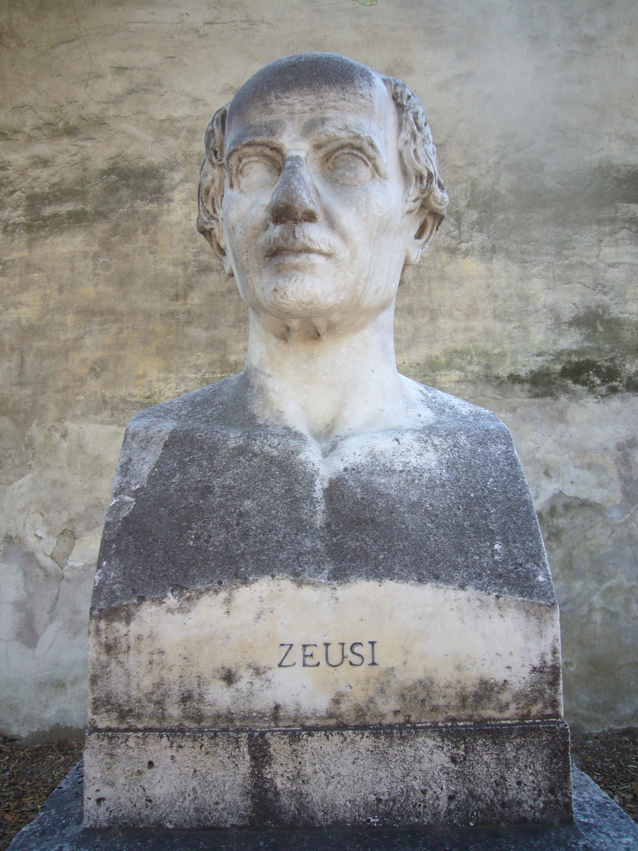 Roma, Pincio. Busto di Zeusi